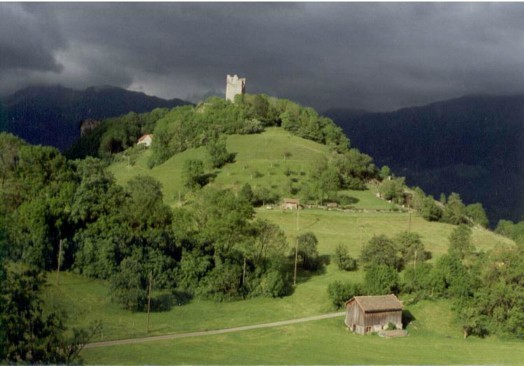 Stimmungsbild aus Wartau, St. Galler Rheintal, Schweiz. Foto von Jakob Vetsch, Juni 1991.